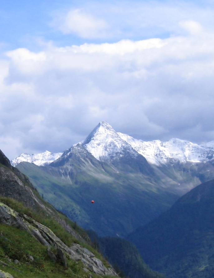 Lasörling von Nordenwesten, vom Anstieg zur Essen-Rostocker Hütte.